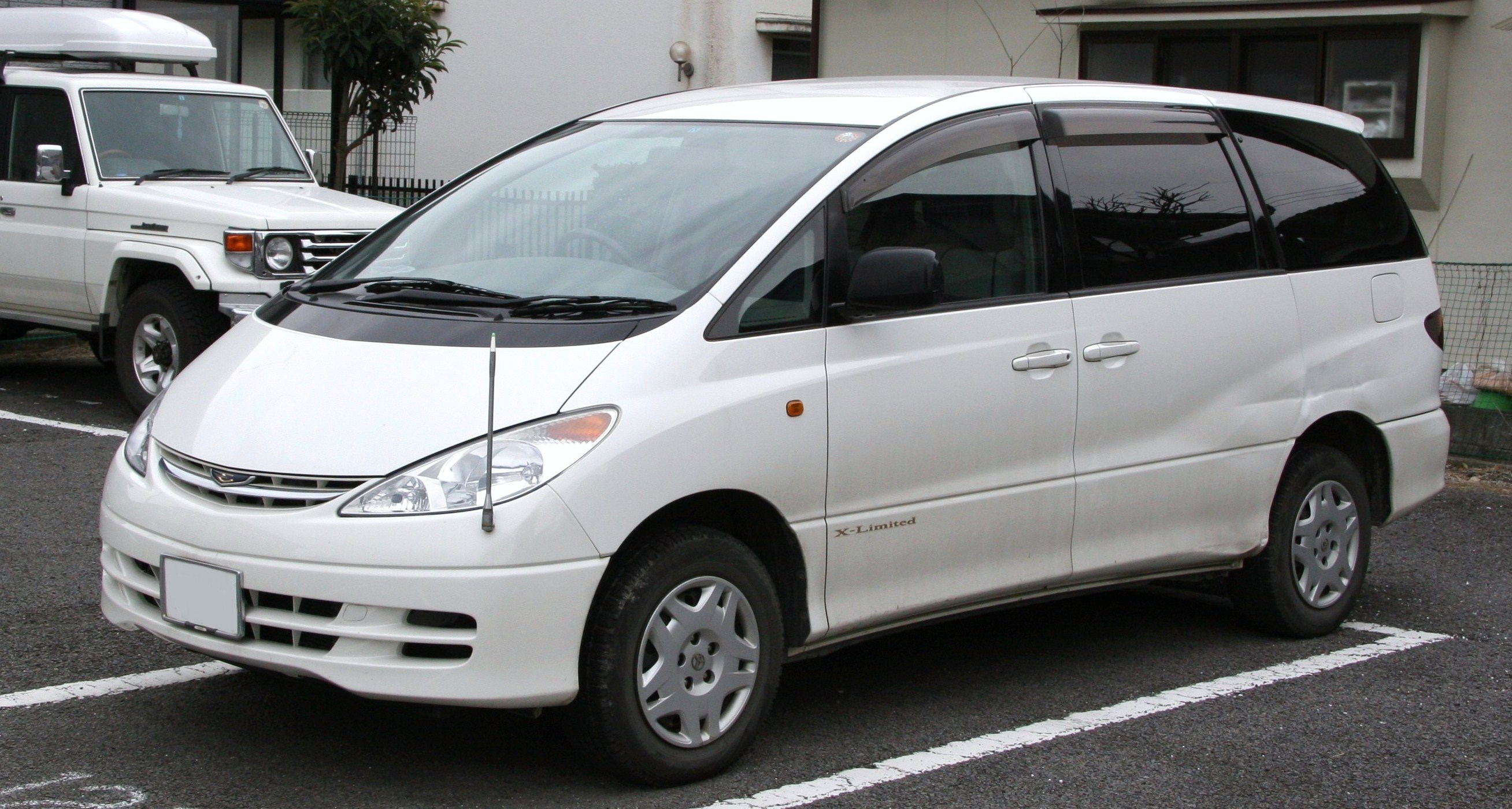 Toyota Estima